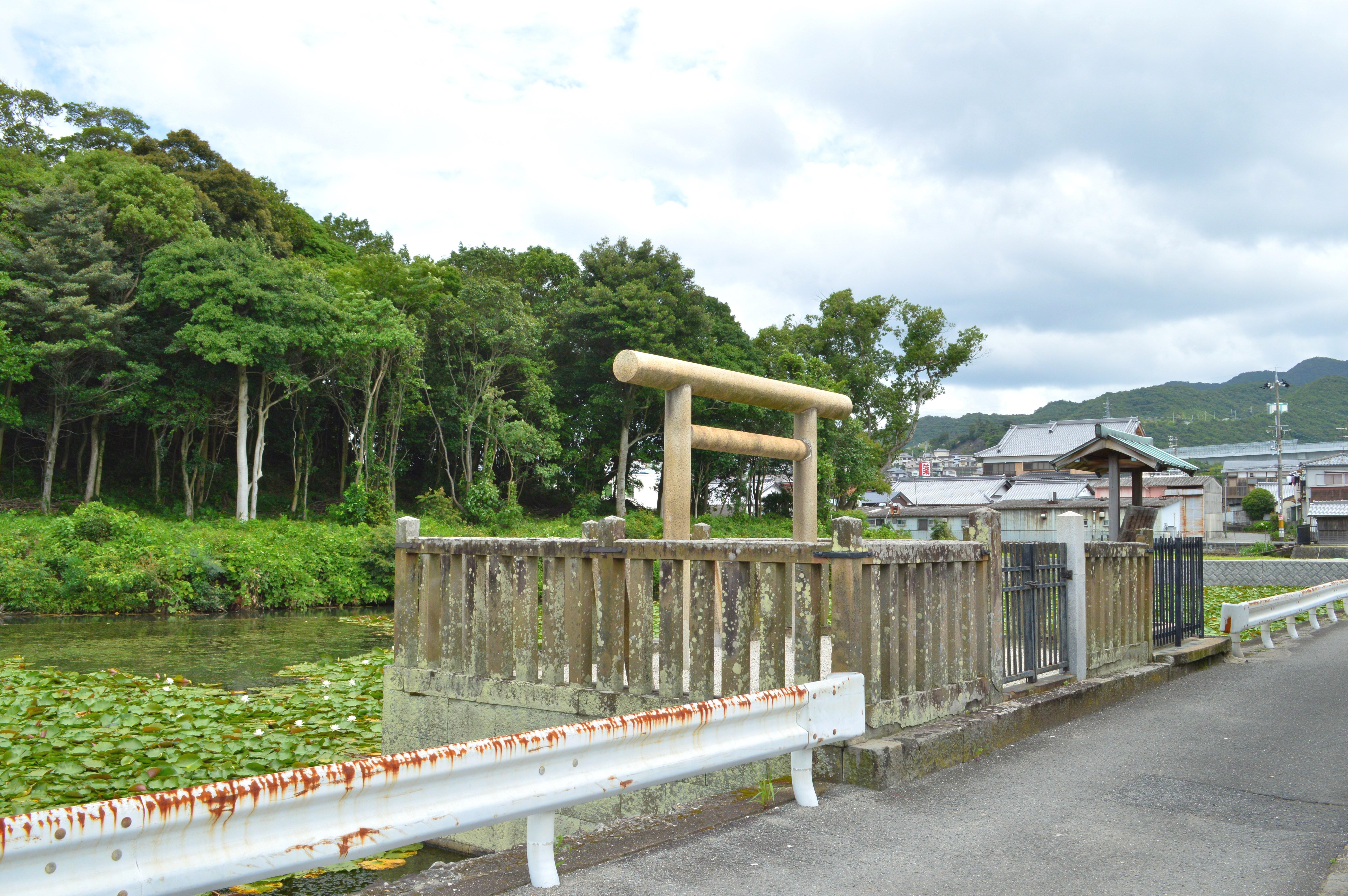 淡輪ニサンザイ古墳 五十瓊敷入彦命宇度墓拝所